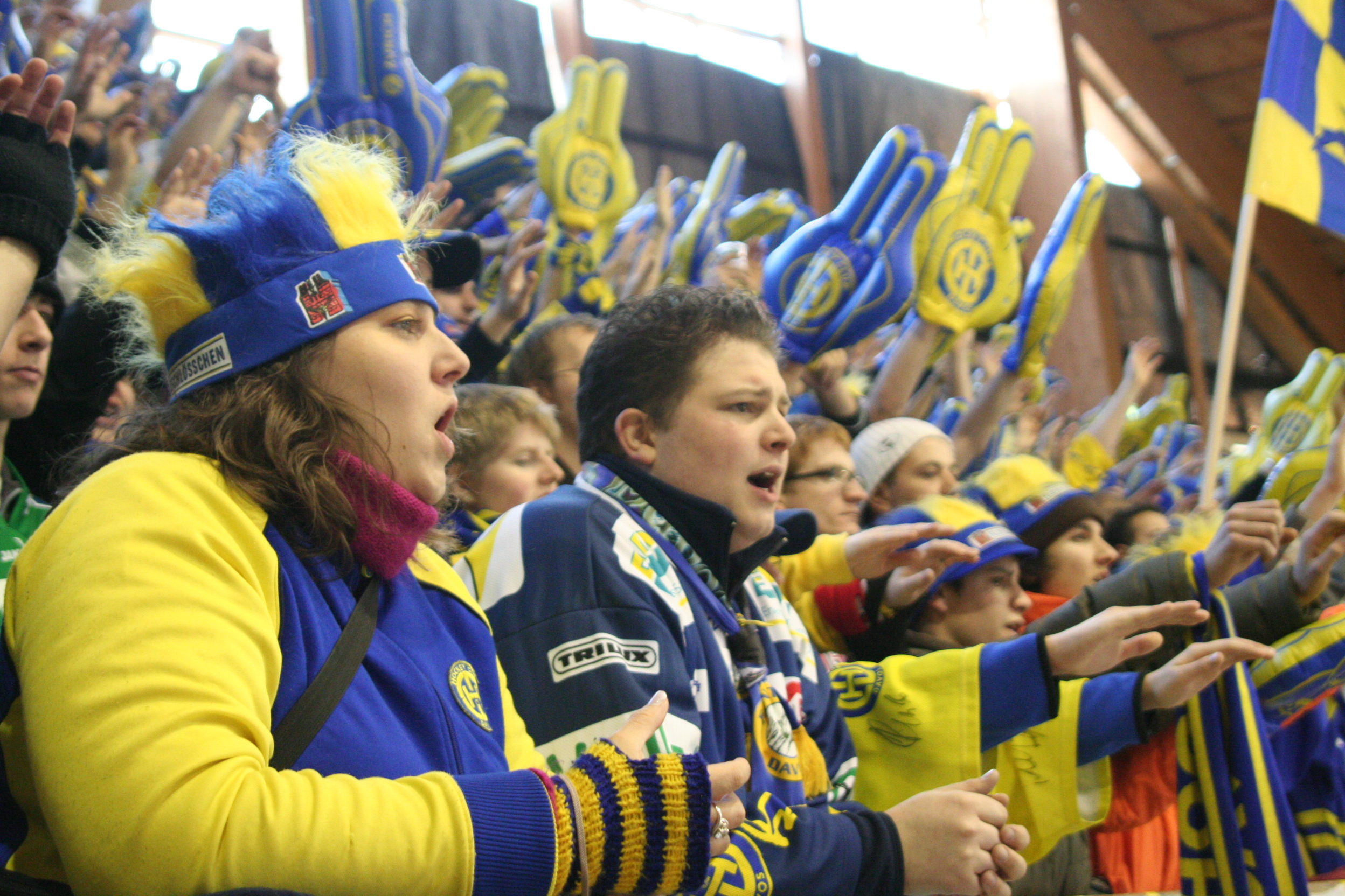 Fans des HC Davos während dem Spengler Cup 2006